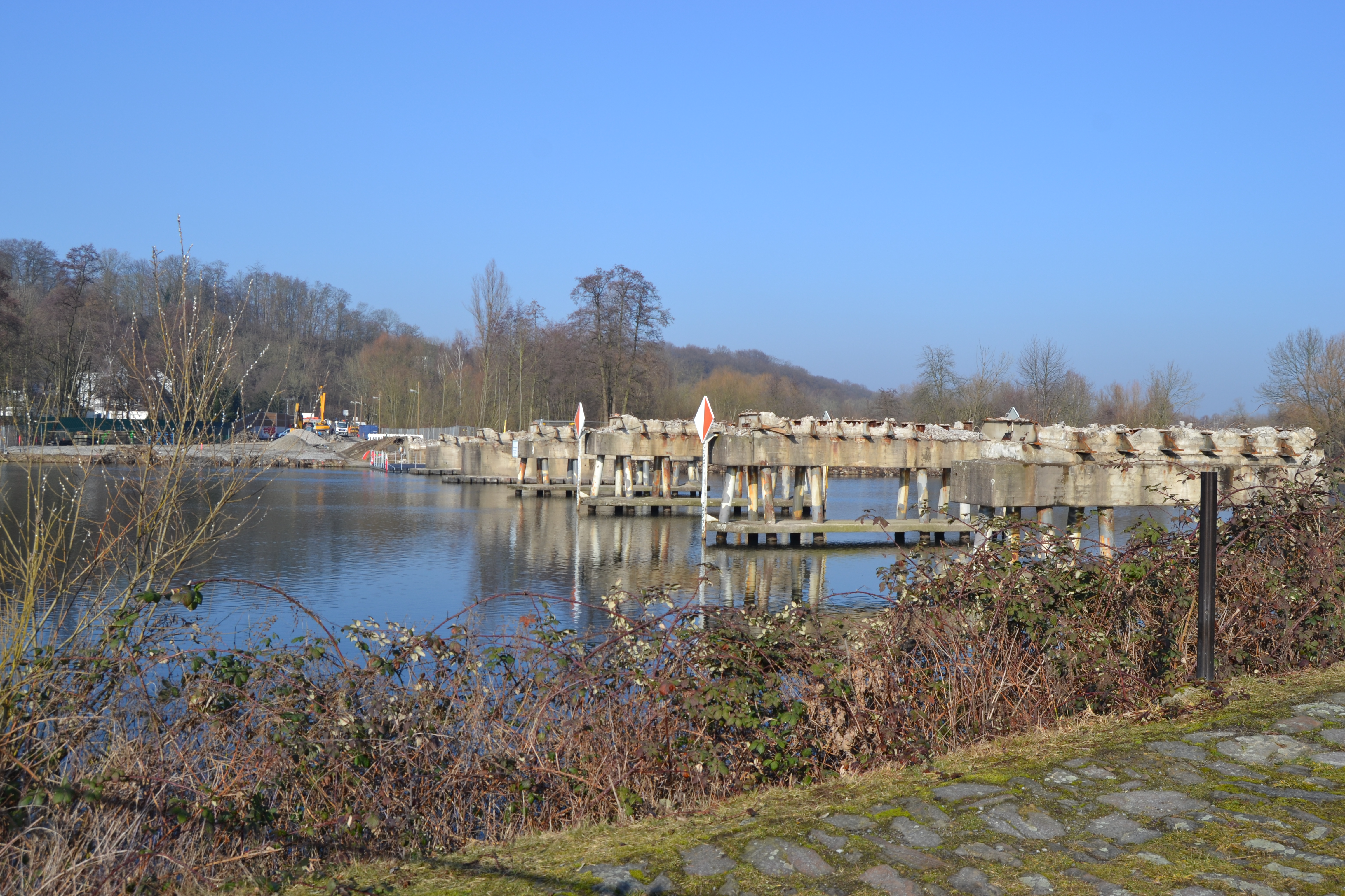 Abrissarbeiten Fortschritt 13.02.2017 Blickwinkel vom Kupferdreher Ufer